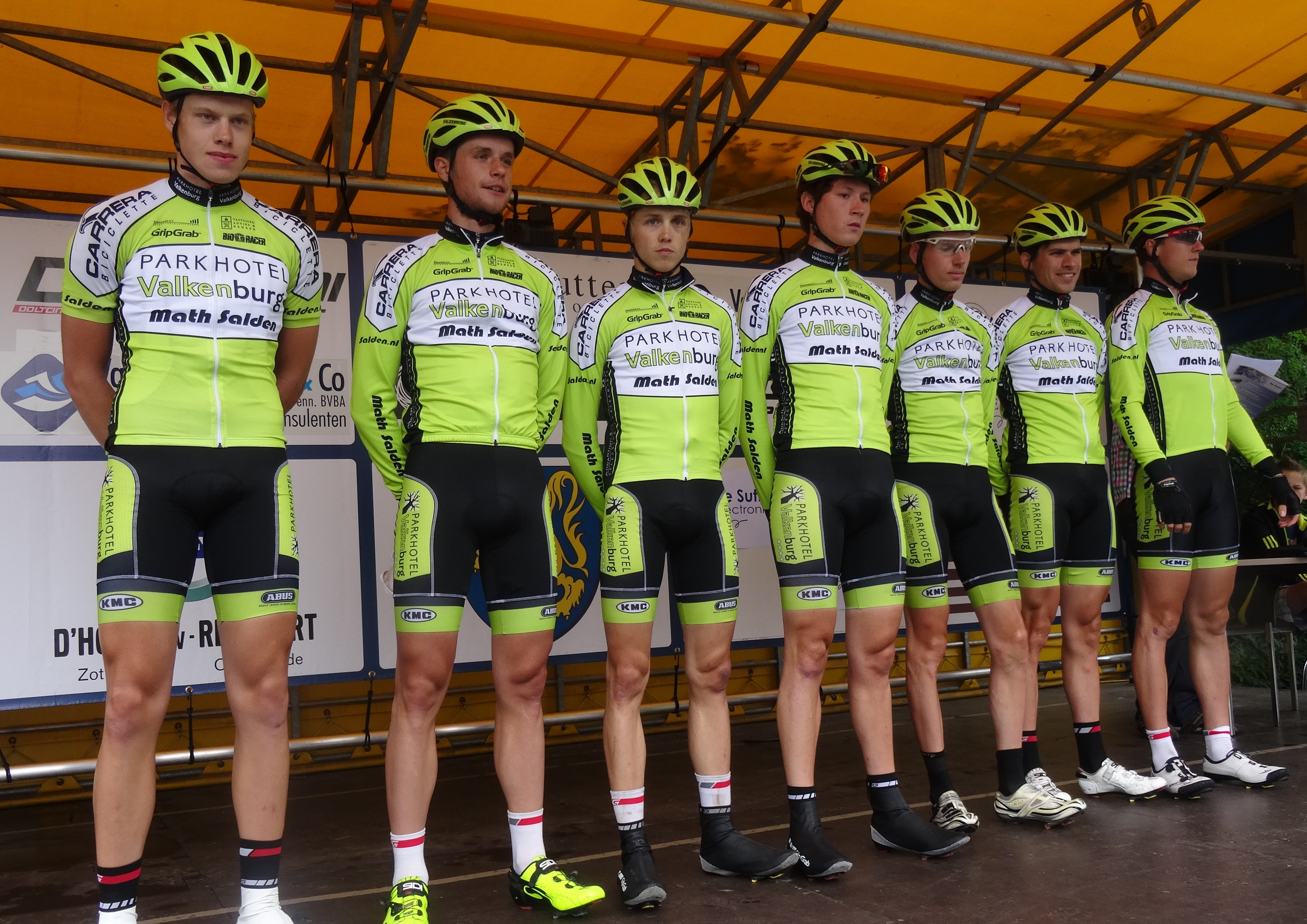 Reportage photographique réalisé le samedi 5 juillet à l'occasion du départ et de l'arrivée du Circuit Het Nieuwsblad espoirs 2014 à Grotenberge (Zottegem), Belgique.